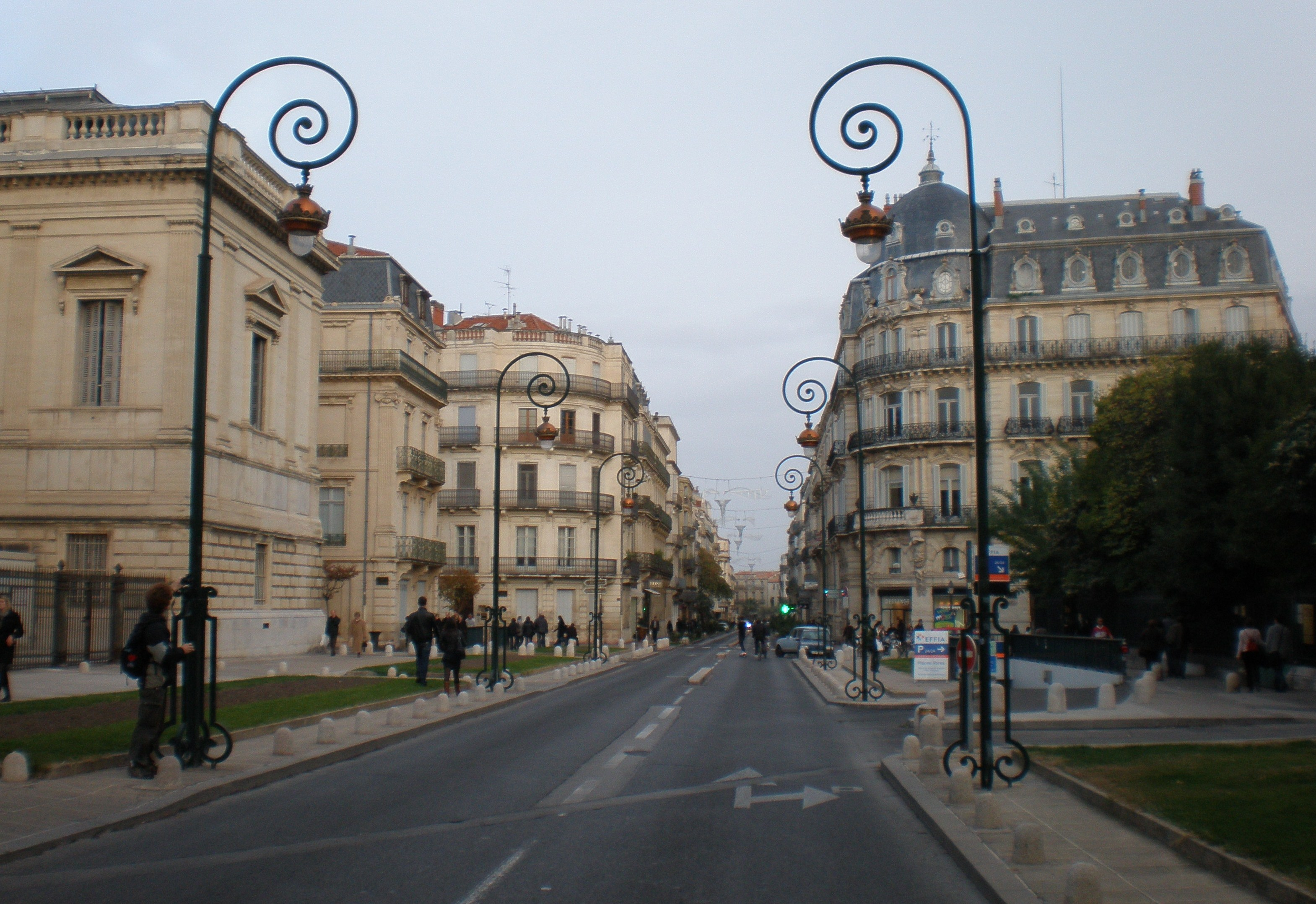 La rue Foch à Montpellier (France).